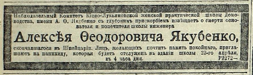 Повідомлення про смерть О.Ф.Якубенка у газеті "Киевлянин", 22 квітня 1917 р.